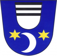 Běhařovice, znak. V modrém štítě nahoře černo-stříbrně dělený štít, v horním poli se dvěma stříbrnými břevny, dole stříbrný dorůstající půlměsíc provázený dvěma zlatými hvězdami.